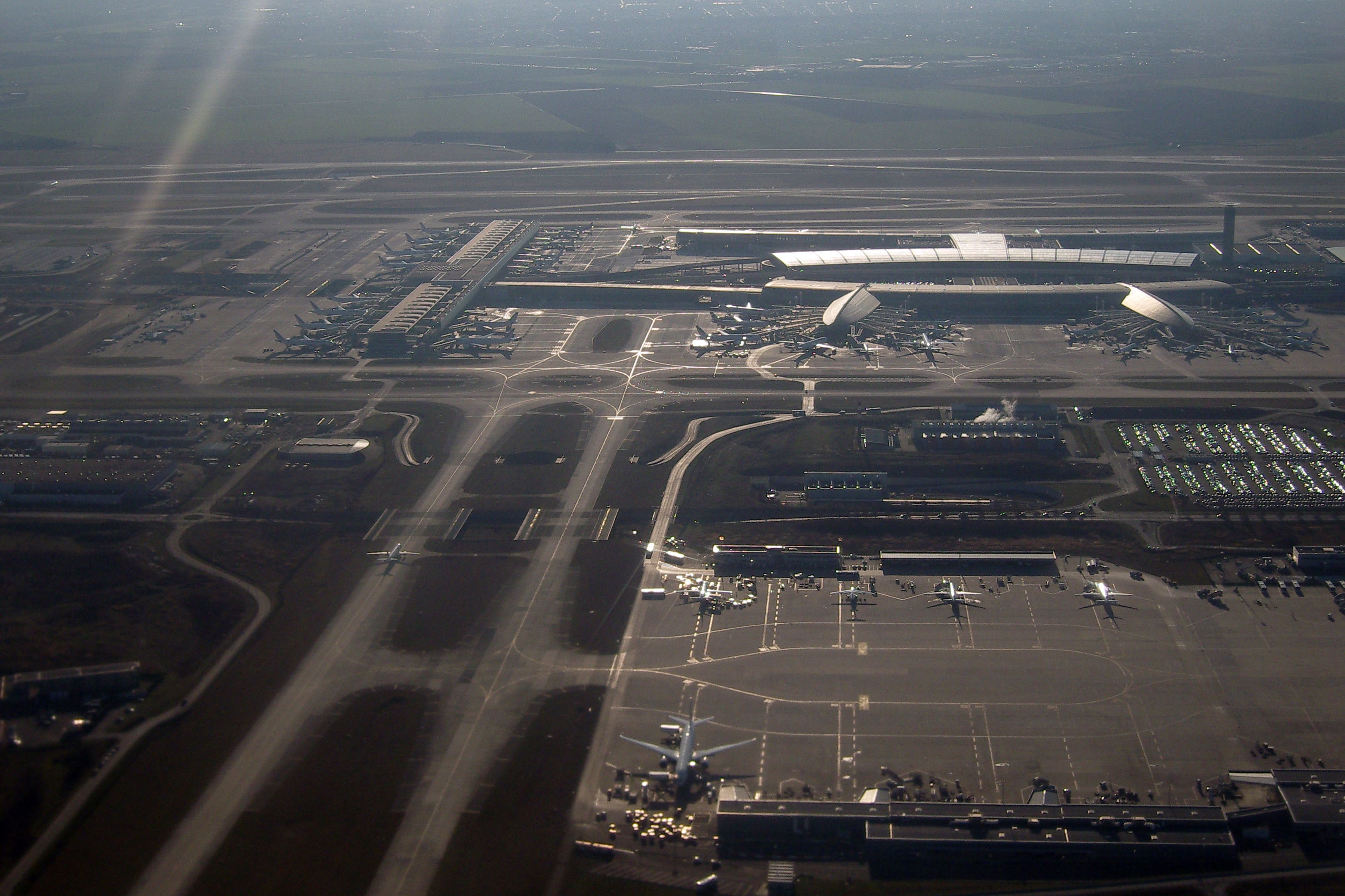 CDG FROM 767 N189DN FLIGHT CDG-ATL